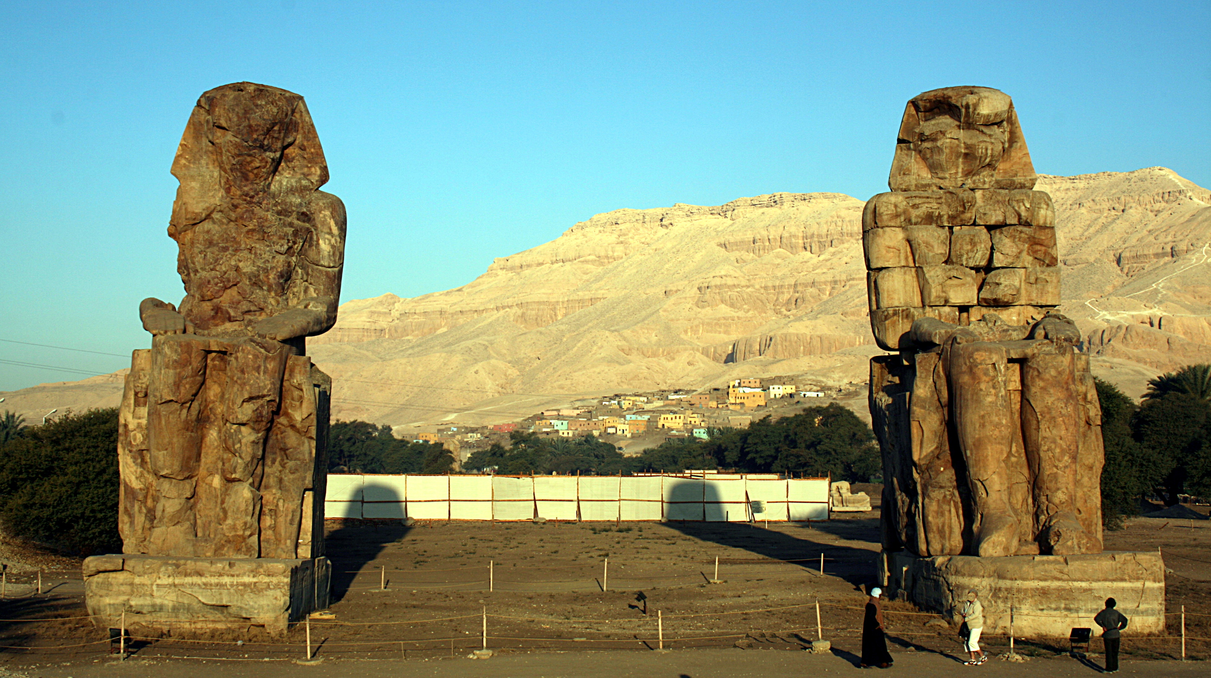 Memnonkolosse